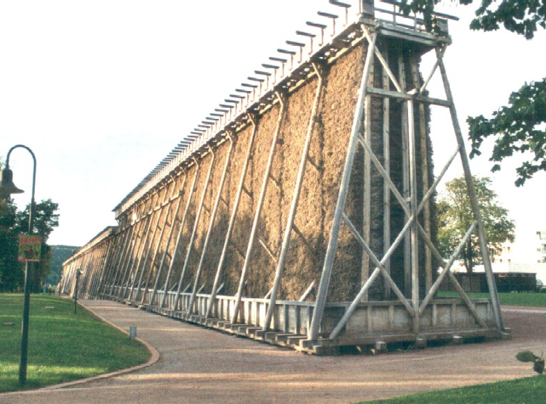 Bad Kösen - Gradierwerk